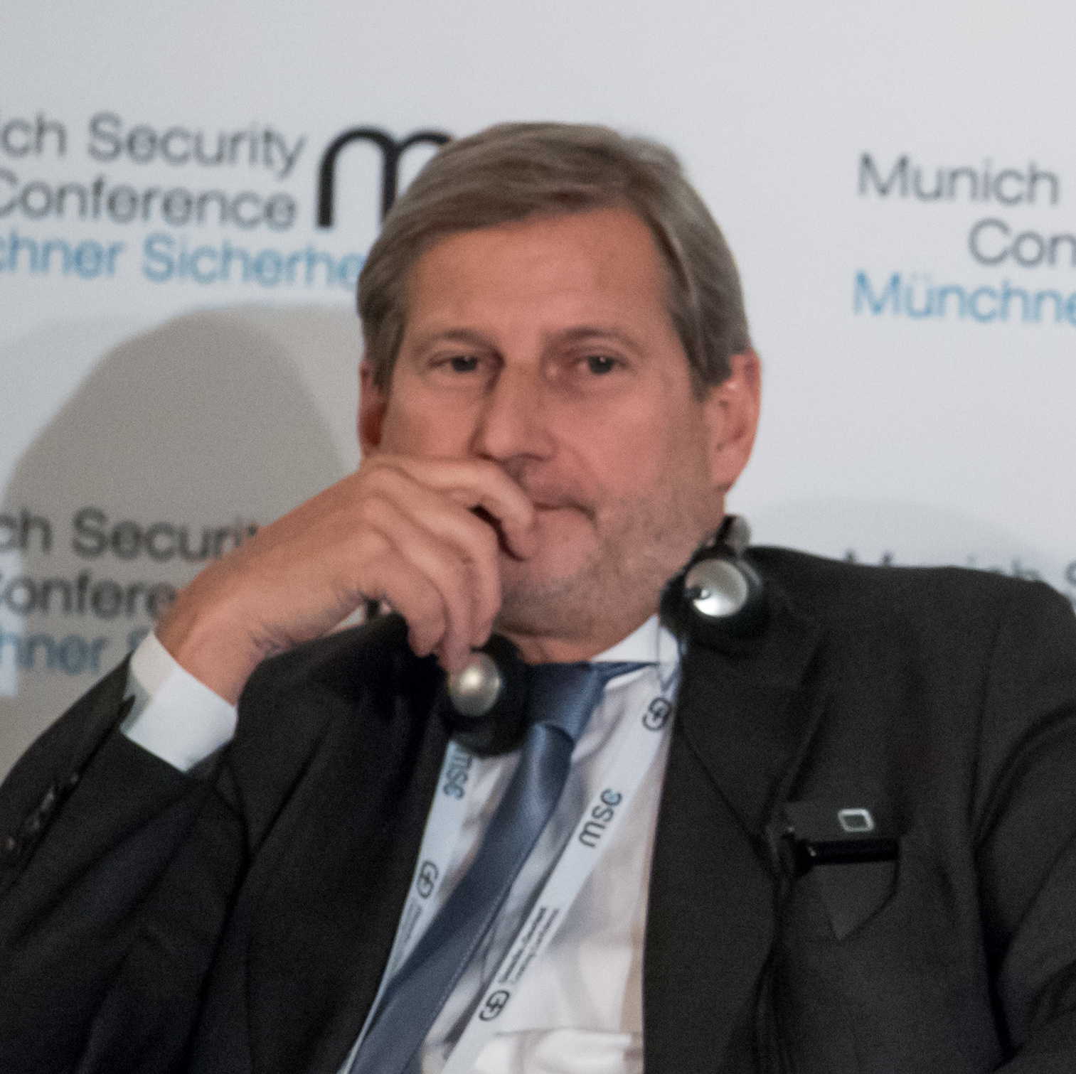 Johannes Hahn und Konstantin Kosachev während der Münchener Sicherheitskonferenz 2018